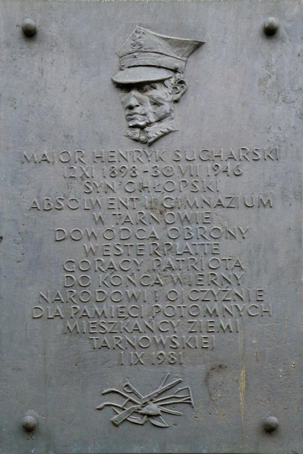 Major Henryk Sucharski - tablica pamiątkowa na byłym budynku gimnazjalnym w Tarnowie